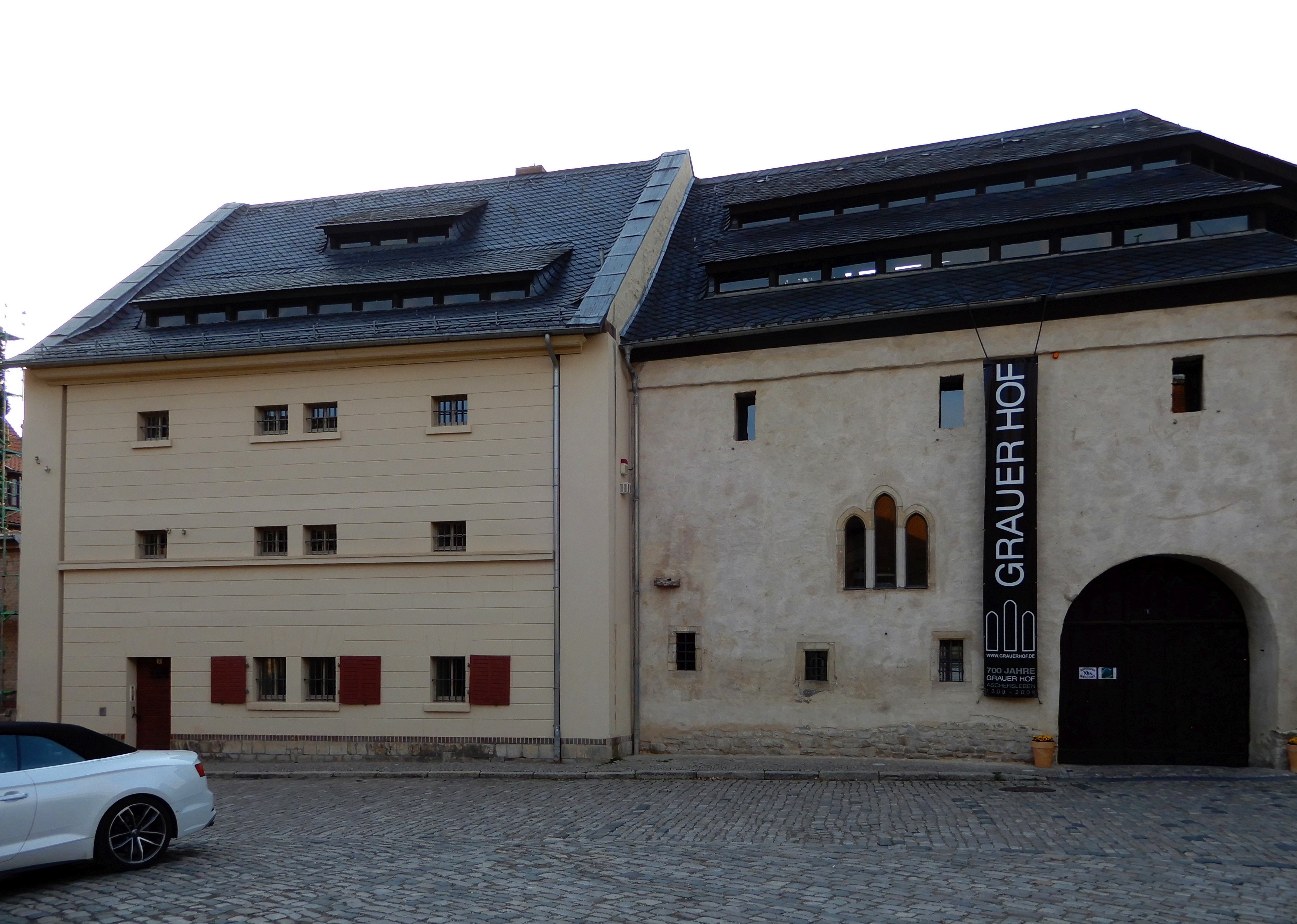 Grauer Hof in Aschersleben